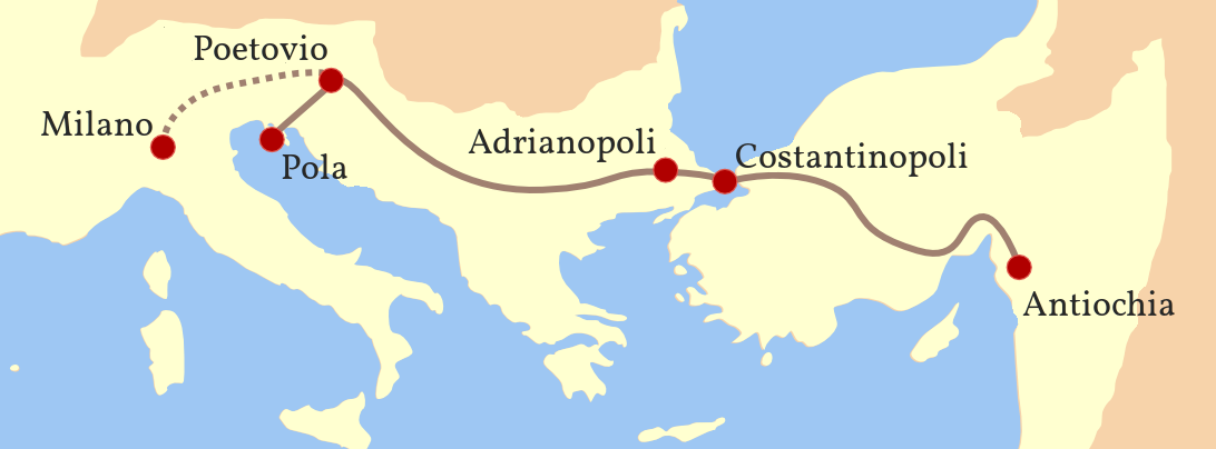 Viaggio di Costanzo Gallo da Antiochia di Siria a Poetovio, suo arresto e arrivo a Pola.